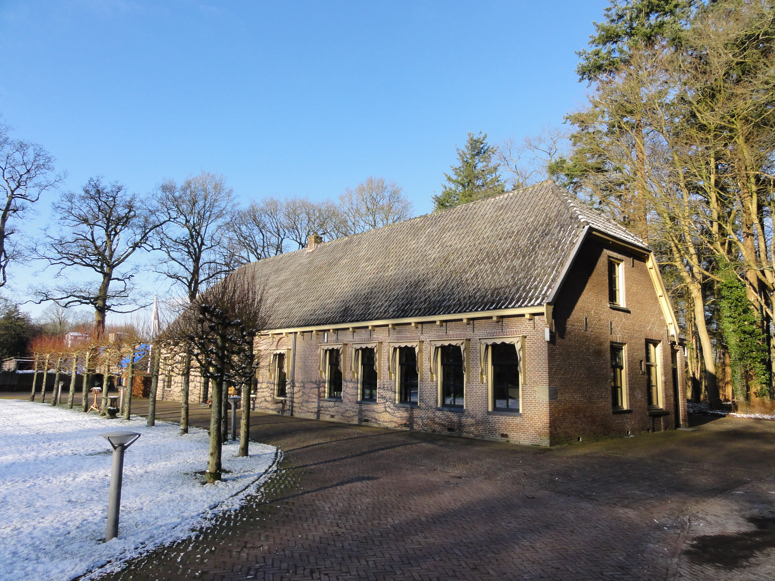 Synagogue (Veenhuizen, Noordenveld)